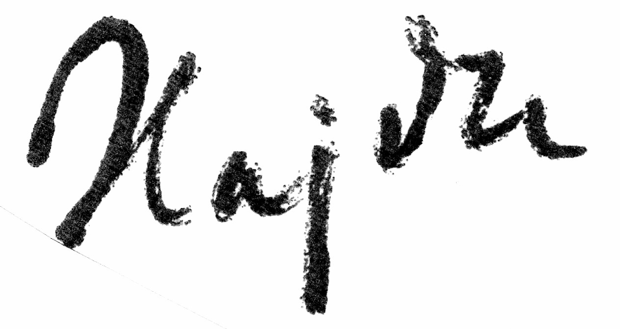 Signature du graveur et sculpteur Étienne Hajdu